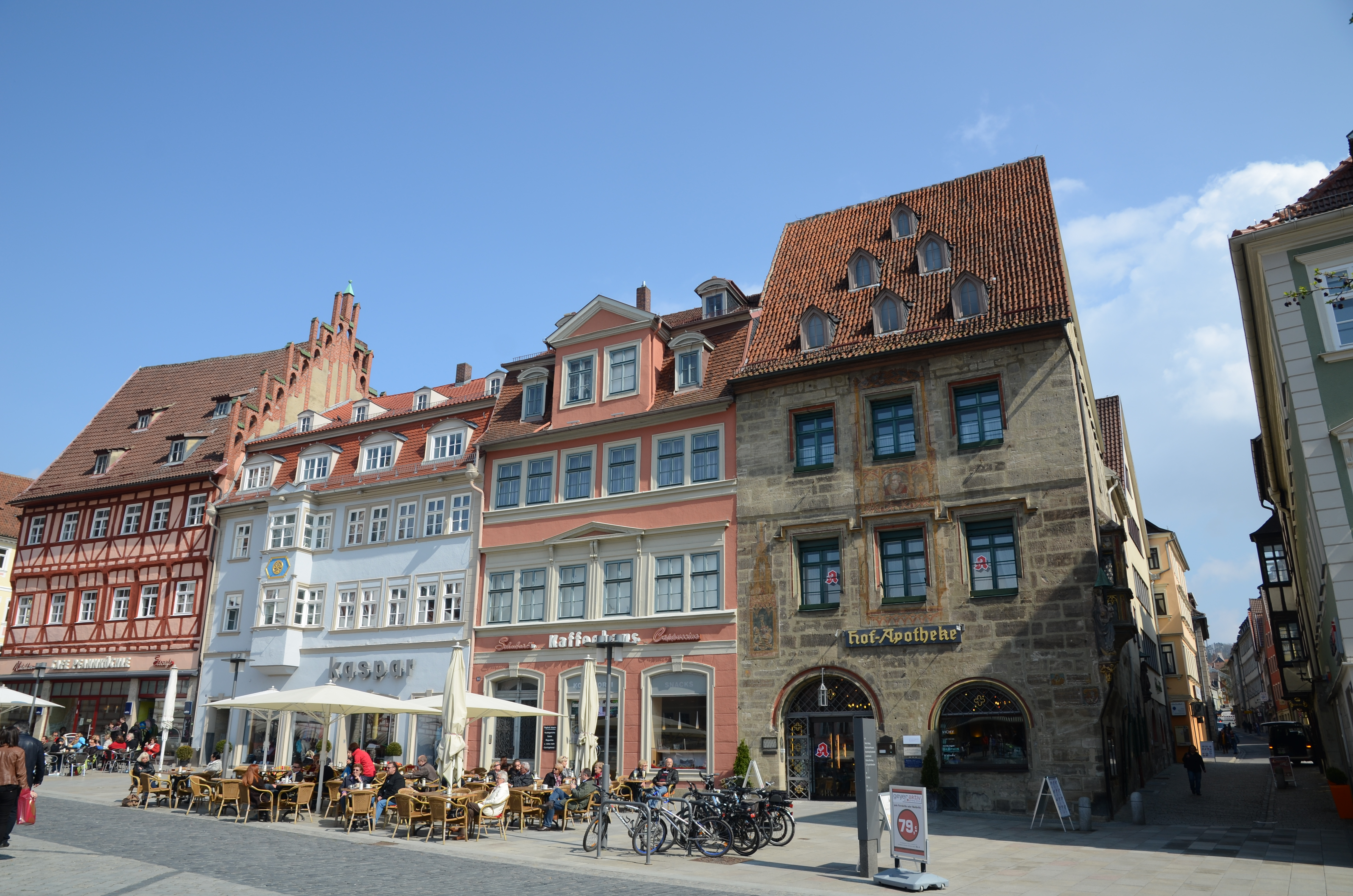 Marktplatz Coburg, Ostseite